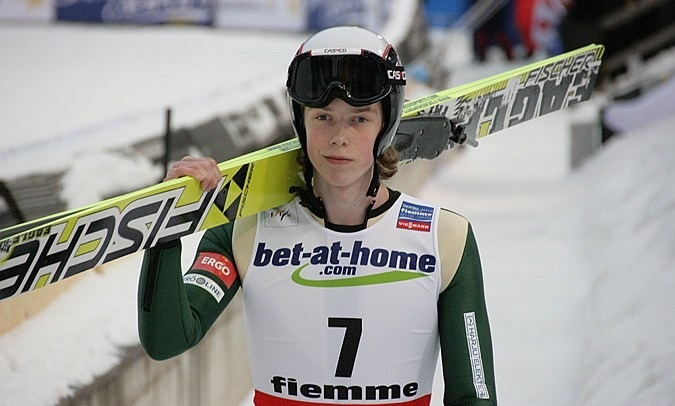 Martti Nomme podczas konkursu indywidualnego mężczyzn na skoczni normalnej w ramach Mistrzostw Świata 2013.